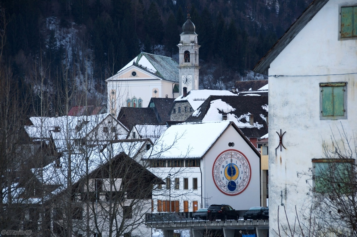 Furlan: Viodude de gleisie e da vecje scuele